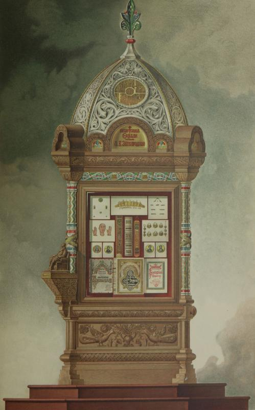 Витрина А.В. Звенигородского в Императорской Санкт-Петербургской Публичной библиотеке